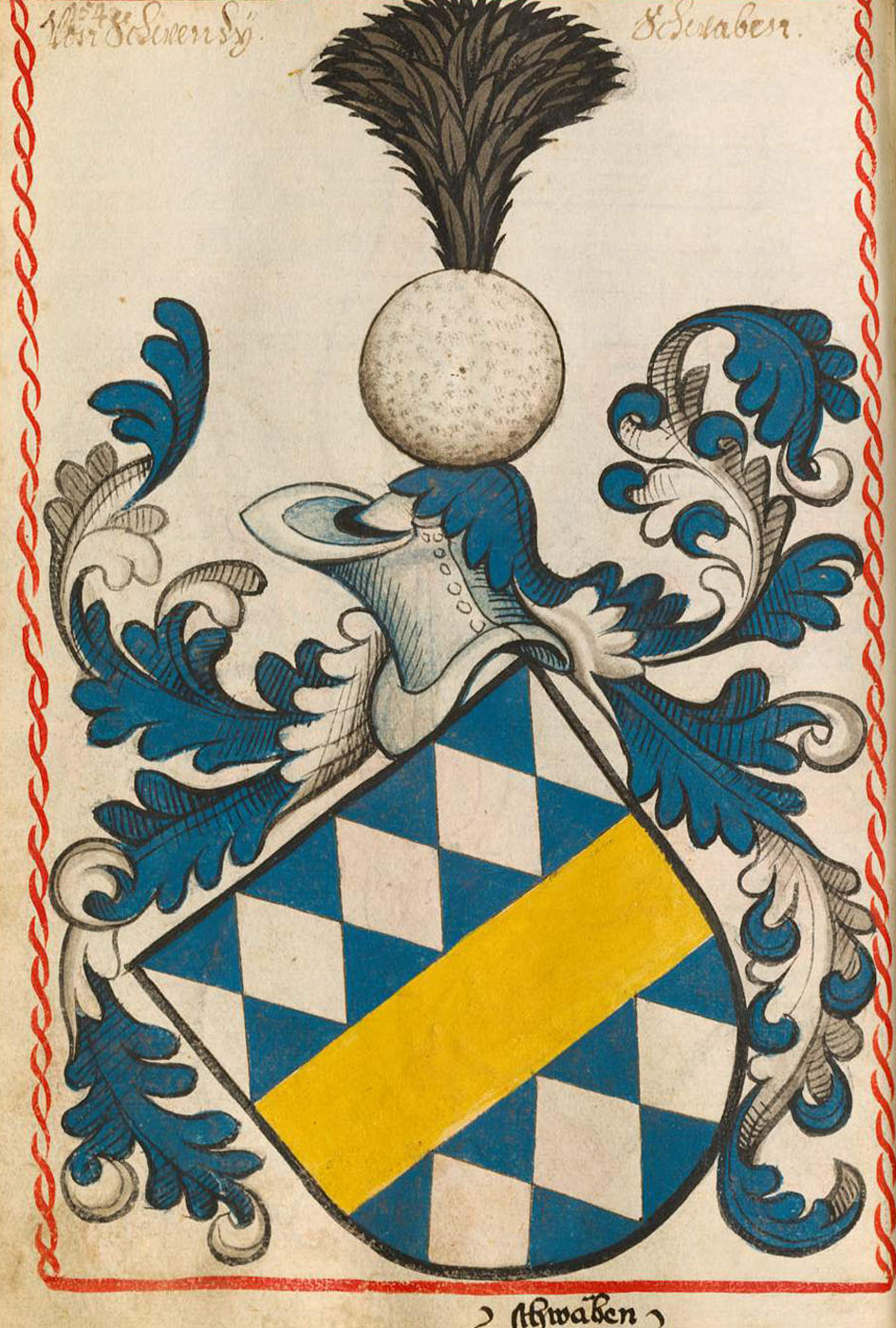 Scheibler'sches Wappenbuch, älterer Teil Seite 154